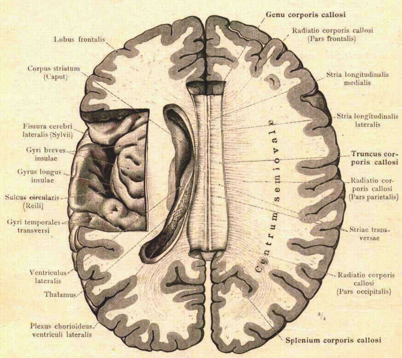 A kérges-test és környezete az emberi agyban